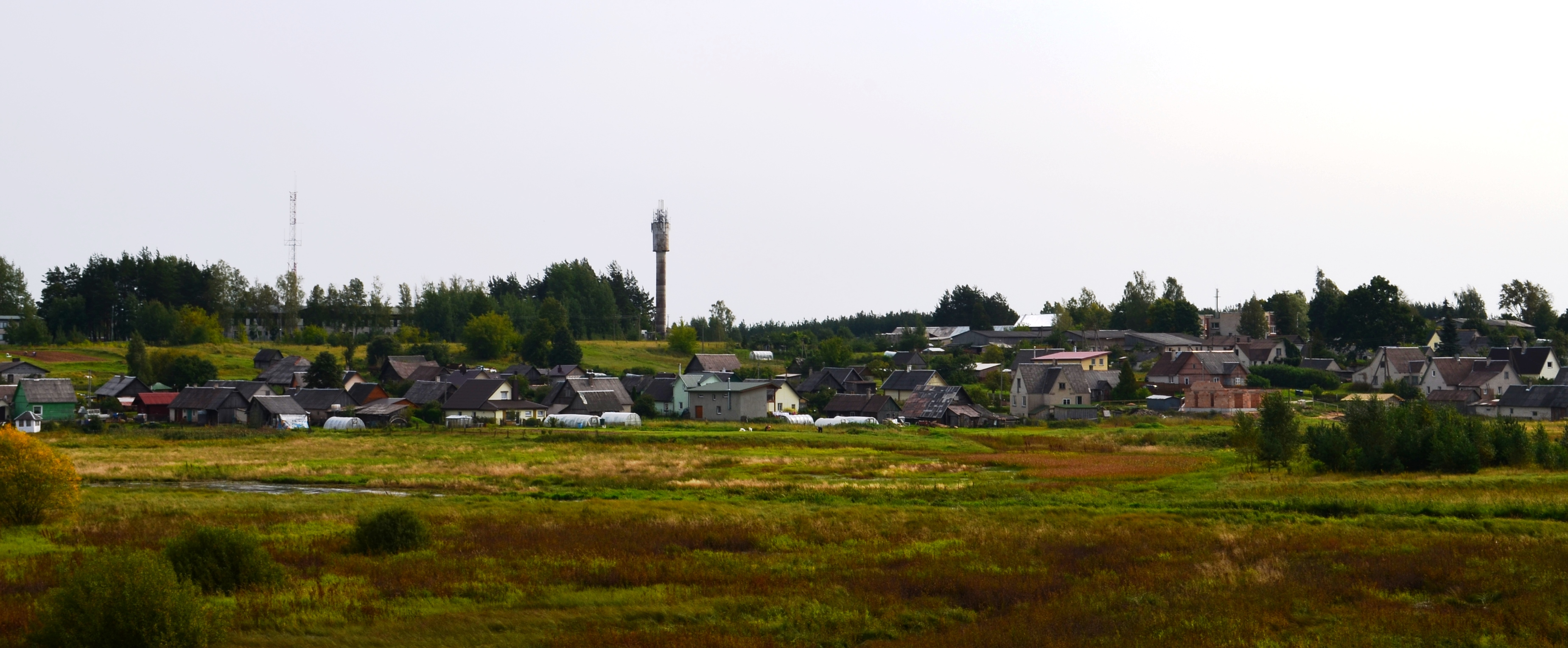 Mickūnai nuo Kranto gatvės (dešinio Vilnios kranto), Vilniaus raj.